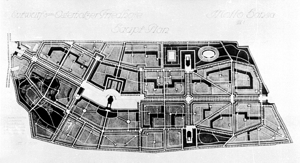 Osterholzer Friedhof in Bremen: Wettbewerbsentwurfplan von Seek und Freye (Aufn. 1906/08). Hauptplan